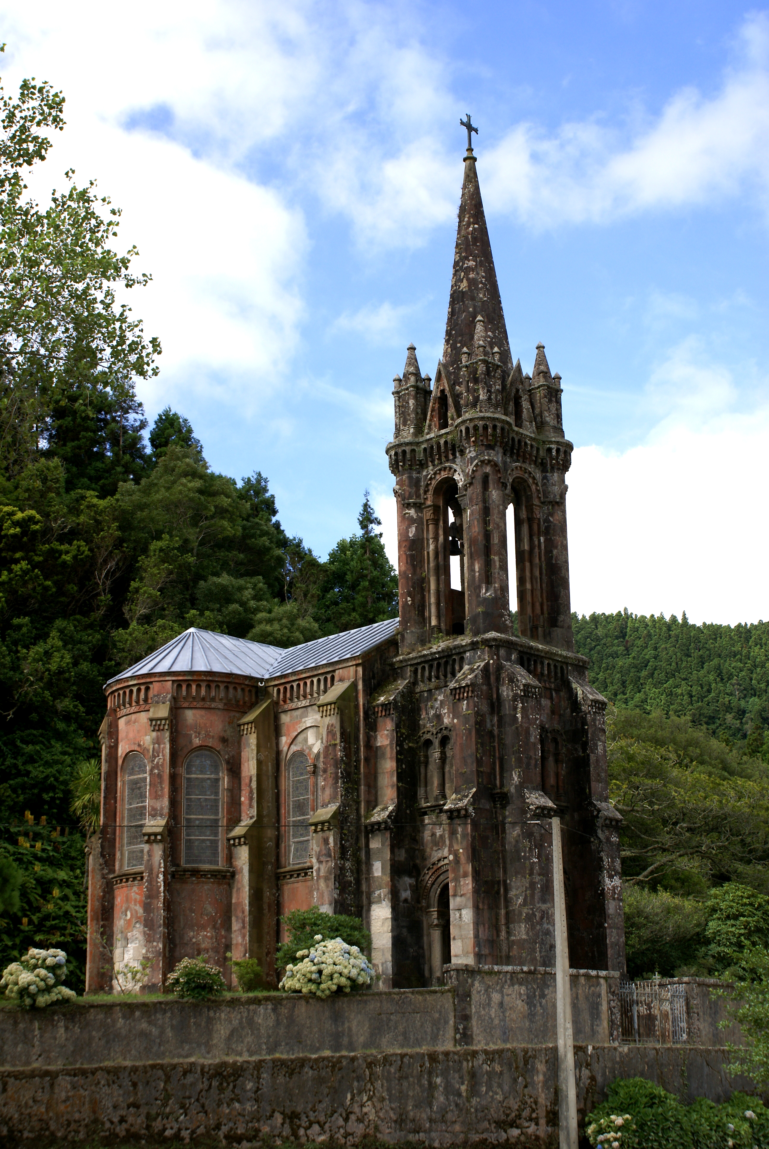 Capela de Nossa Senhora das Vitórias, (Ermida de José do Canto), fachada, Lagoa das Furnas, ilha de São Miguel, Açores.